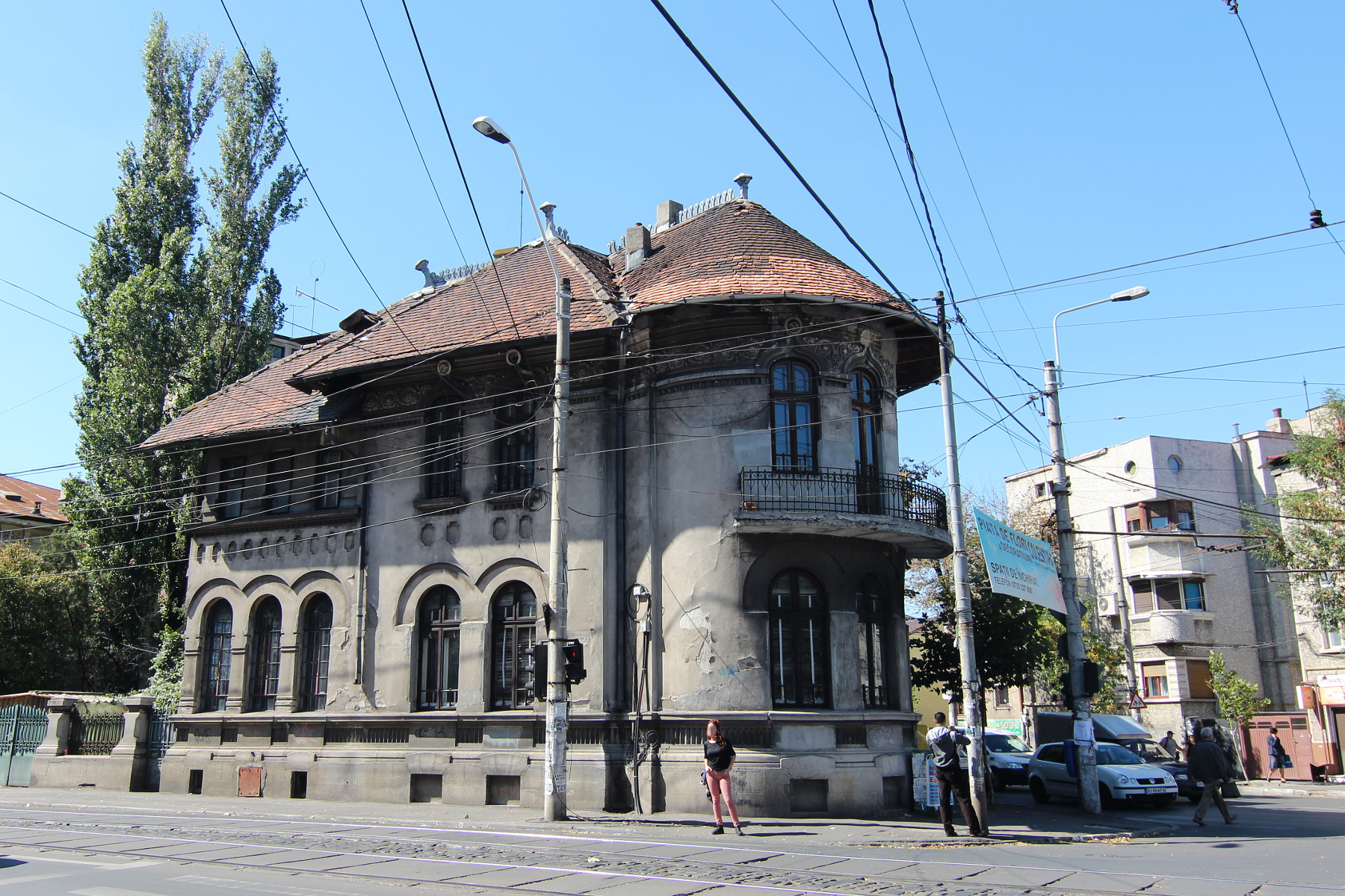 Casă pe strada Traian